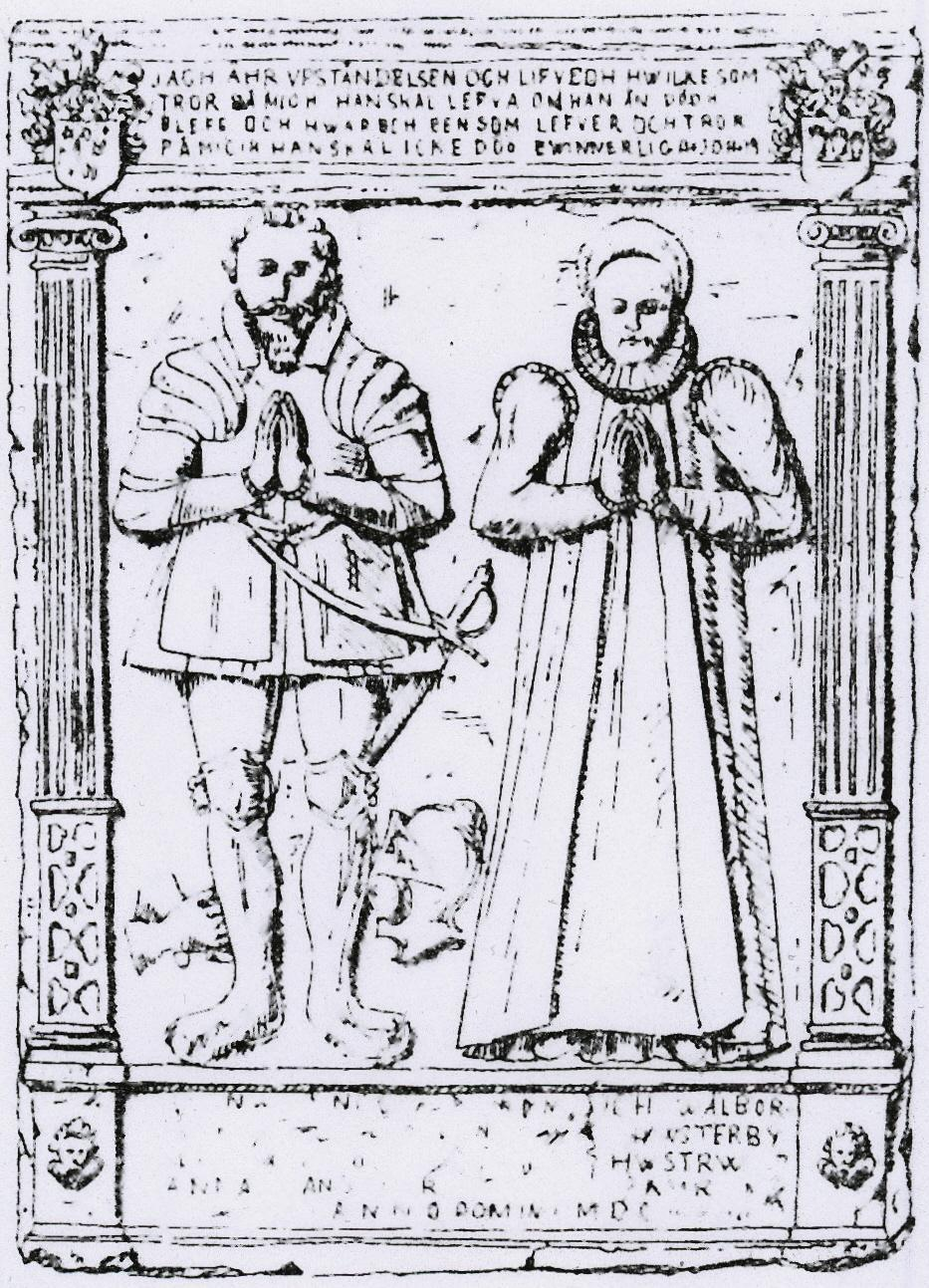 Arvid Tönnesson Wildeman, till Tjusterby i Pernå, statsman och krigare, död 1617 och begraven i Pernå kyrka, Finland. Wildeman deltog 1593 i en beskickning från Klas Eriksson Fleming till Sigismund Vasa i Polen. Sedermera var han en av det kungliga partiets mest pålitliga och använda anhängare i Finland, var 1596 häradshövding i Borgå län och utsågs 1599 till amiral i Finland. I den därpå följande kampen med hertig Karl hade han ringa framgång. Hans flotta föll vid Helsingfors delvis i dennes händer, medan han själv med några fartyg flydde till Reval. Redan följande år försonade han sig dock med hertig Karl och vann inom kort hans ynnest. Han blev häradshövding i Kymmene härad samt Pyttis och Elimä socknar 1601, ståthållare på Viborgs slott 1602 samt lagman i Karelen 1608 och därjämte i Kexholms län 1611. Likaså användes han av Gustaf II Adolf såväl i krigiska värv som i underhandlingar. Wildeman var en av dem, vilka å Sveriges vägnar undertecknade freden i Stolbova 1617. Gift med Anna Hansdotter Björnram, dotter av amiralen Hans Larsson till Isnäs och hans första hustru Anna Pehrsdotter Ollon. Gravhällen i Pernå kyrka framställer ståthållaren Arvid Tönnesson Wildeman i krigarrustning och hans fru Anna Hansdotter Björnram iklädd den tidens kvinnodräkt, båda med över bröstet till bön hoplagda händer. Upptill på stenen läses bibelspråket 11 Joh. 25—26 mellan Wildemanska och Björnramska vapnen. Vad det senare beträffar så visar det en avvikelse från det vanligen förekommande. Skölden är nämligen här tudelad med trenne upprätta björnramar i övre fältet, varjämte hjälmprydnaden utgöres av tvenne sådana ramar. Under bilderna finnes följande uthugget: [DENNA (?)] STEEN HÖR[ER(?) DE]N EDLE OCH WÄLBOR : DO . . M . . ARVID TÖNNESON [T]I[L] TIVSTERBY TILL . . S . . . [F]OR SIGH (?) SIN KÄRE HWSFRW ANNA HANS DOTTER OCH BEGGE[S]; THERES K[Ä]RE BARN ANNO DOMINI MDCX .